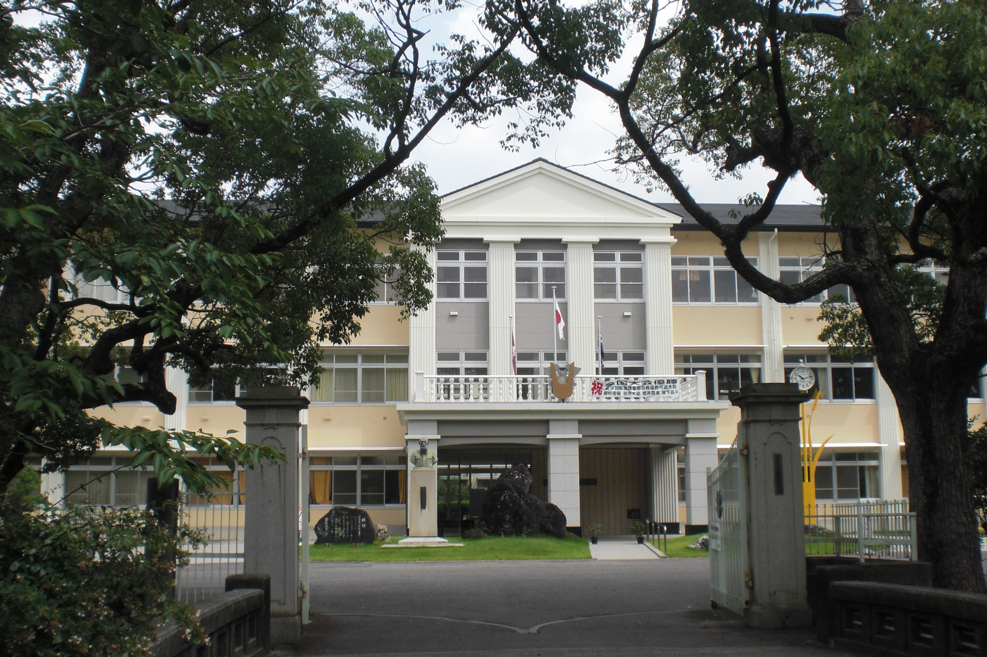 安城農林高校の新本館と正門